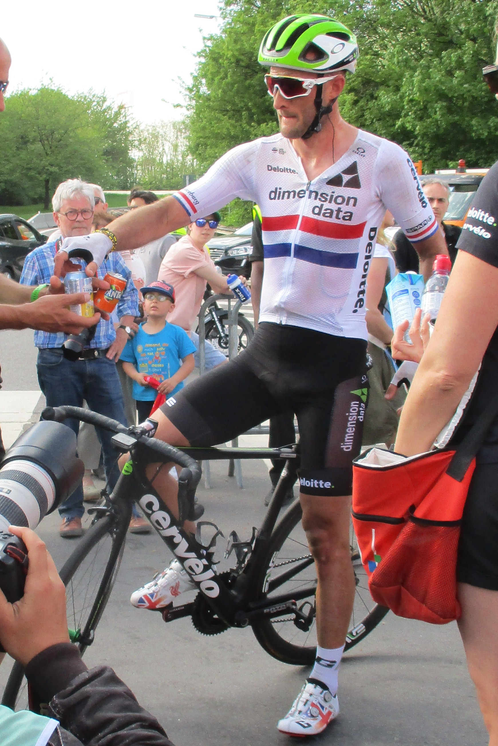 Finish van Luik-Bastenaken-Luik 2018 in Ans.